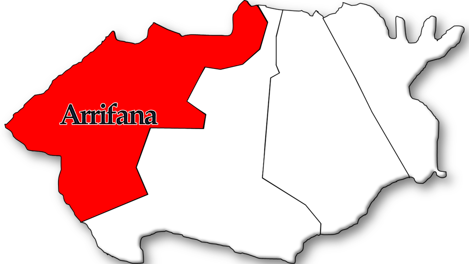 População